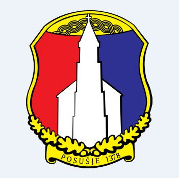 posušje grb